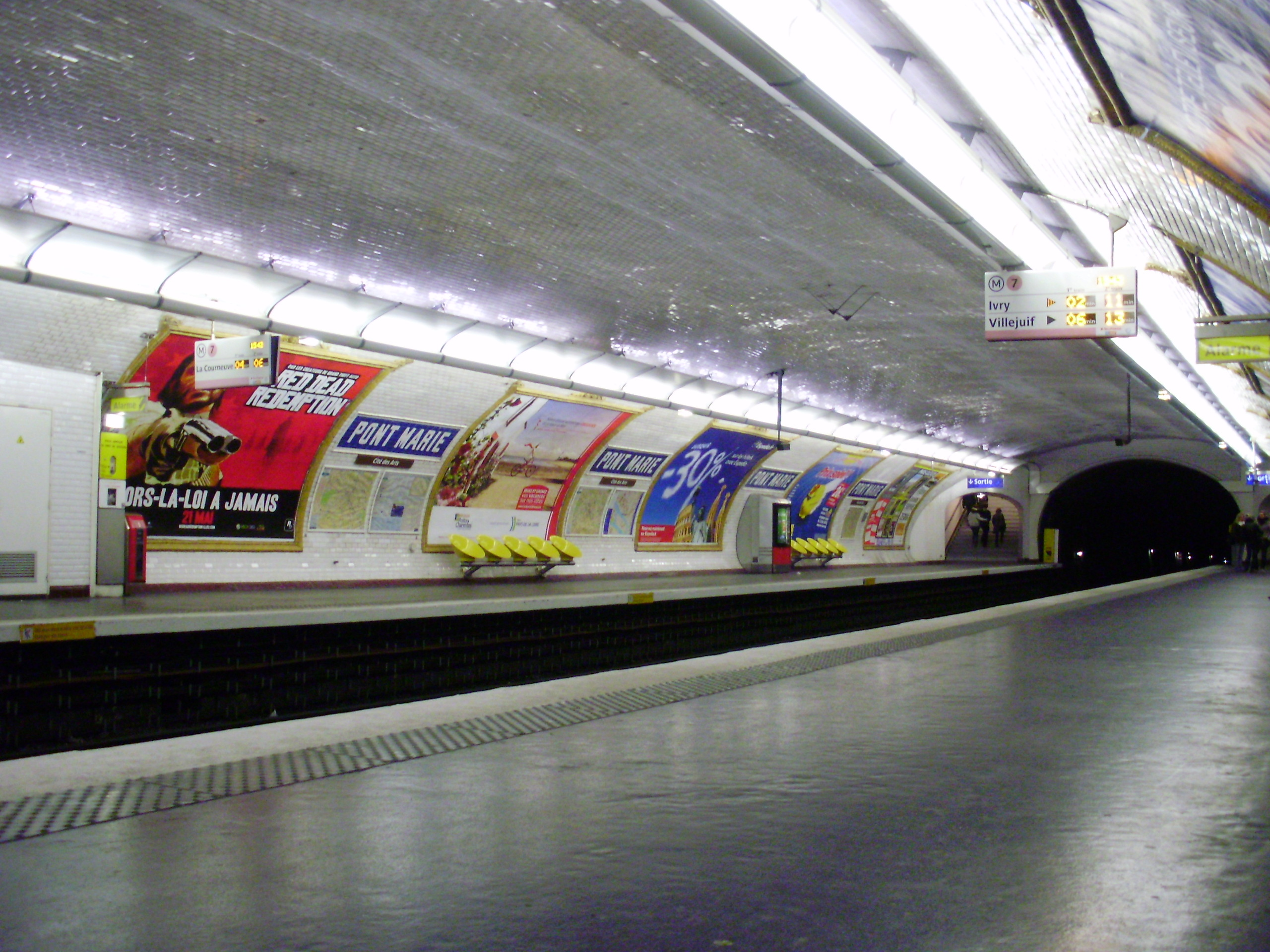 Quais de la station « Pont Marie » du métro de Paris